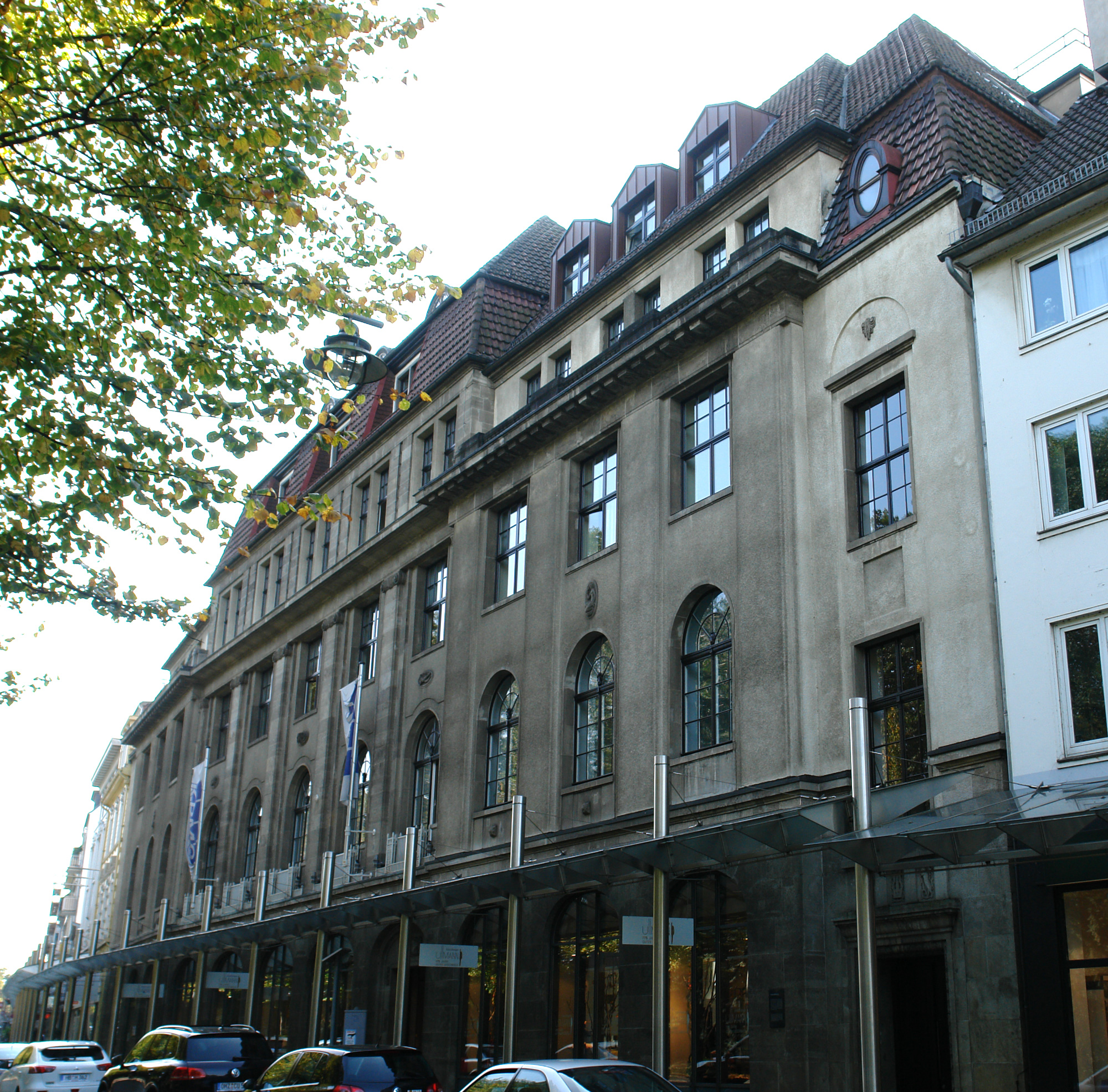 Stallmann und Harder in Bremen, Am Wall 175. Das abgebildete Objekt ist ein geschütztes Kulturdenkmal in der Freien Hansestadt Bremen, mit der Nr. 0082 beim Landesamt für Denkmalpflege registriert.